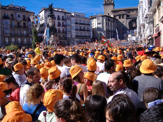 Foto inauguratie feesten Vitoria. Door J.van Vliet